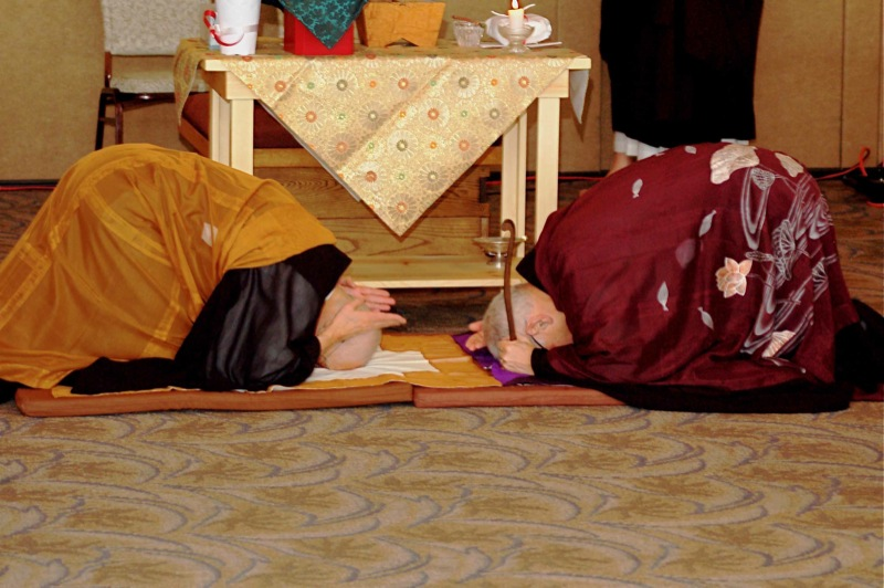 Michel Genko Dubois Shiho